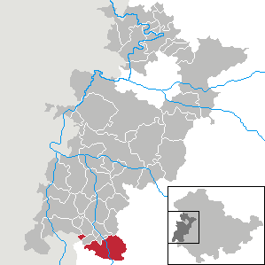 Kaltennordheim in Thuringia - Wartburgkreis